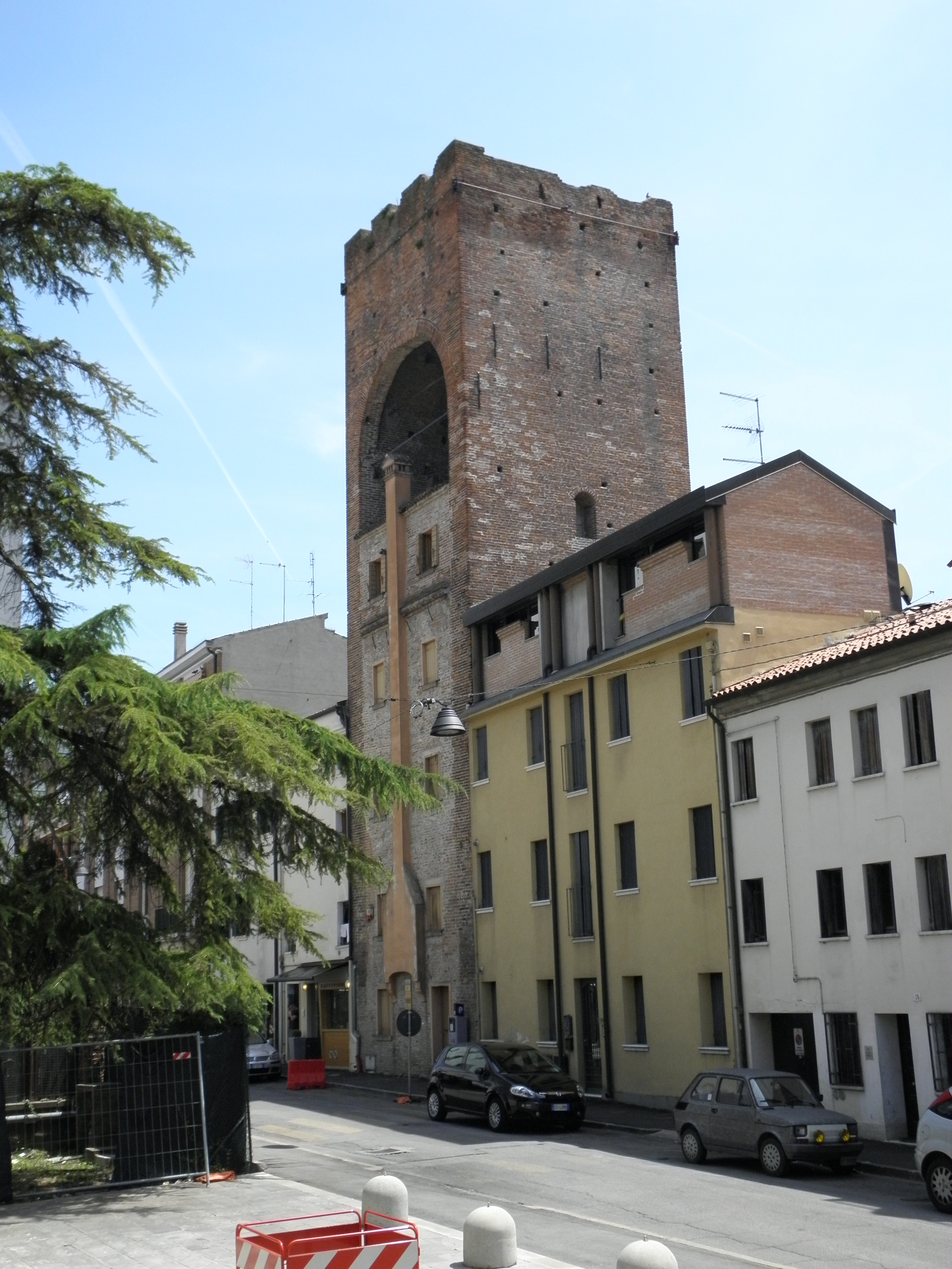 Rovigo: la Torre Pighin vista da Via Pighin.